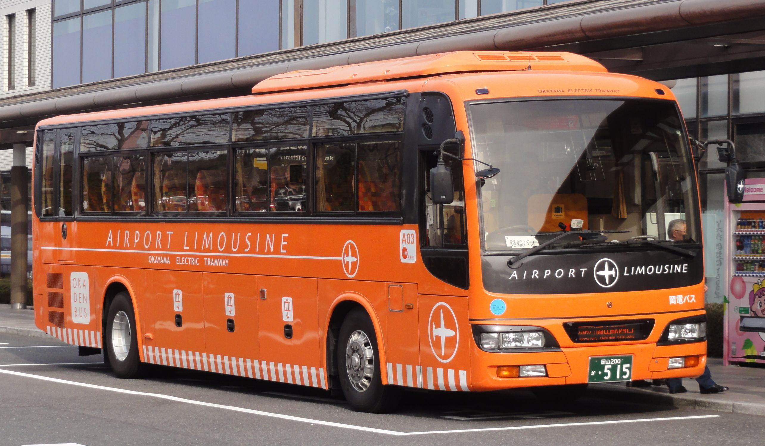 岡山電気軌道バス エアポートリムジン